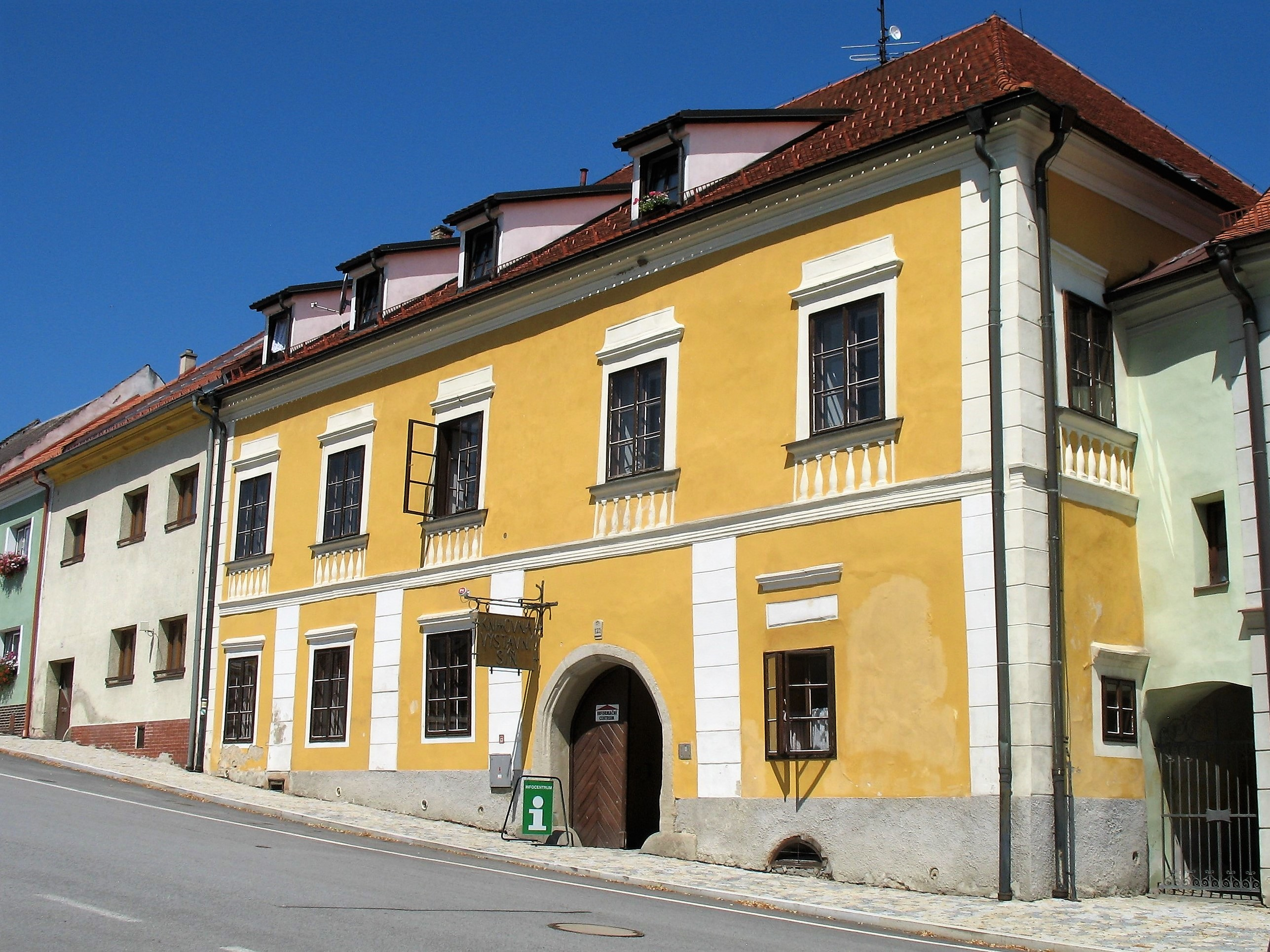 Měšťanský dům čp. 125 na náměstí v Benešově nad Černou, okres Český Krumlov. Kulturní památka